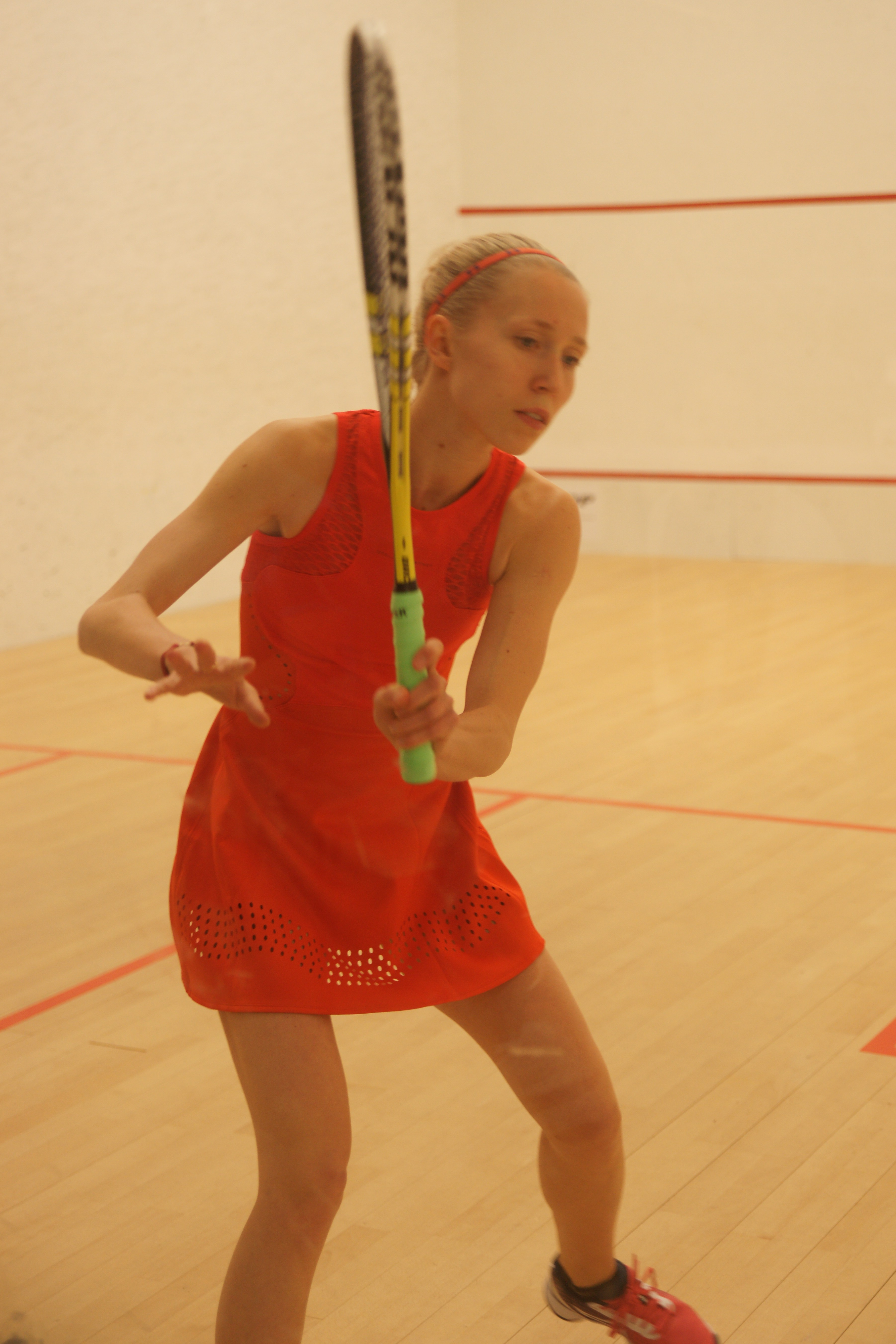 Anna Serme, Monaco Squash classic 2018